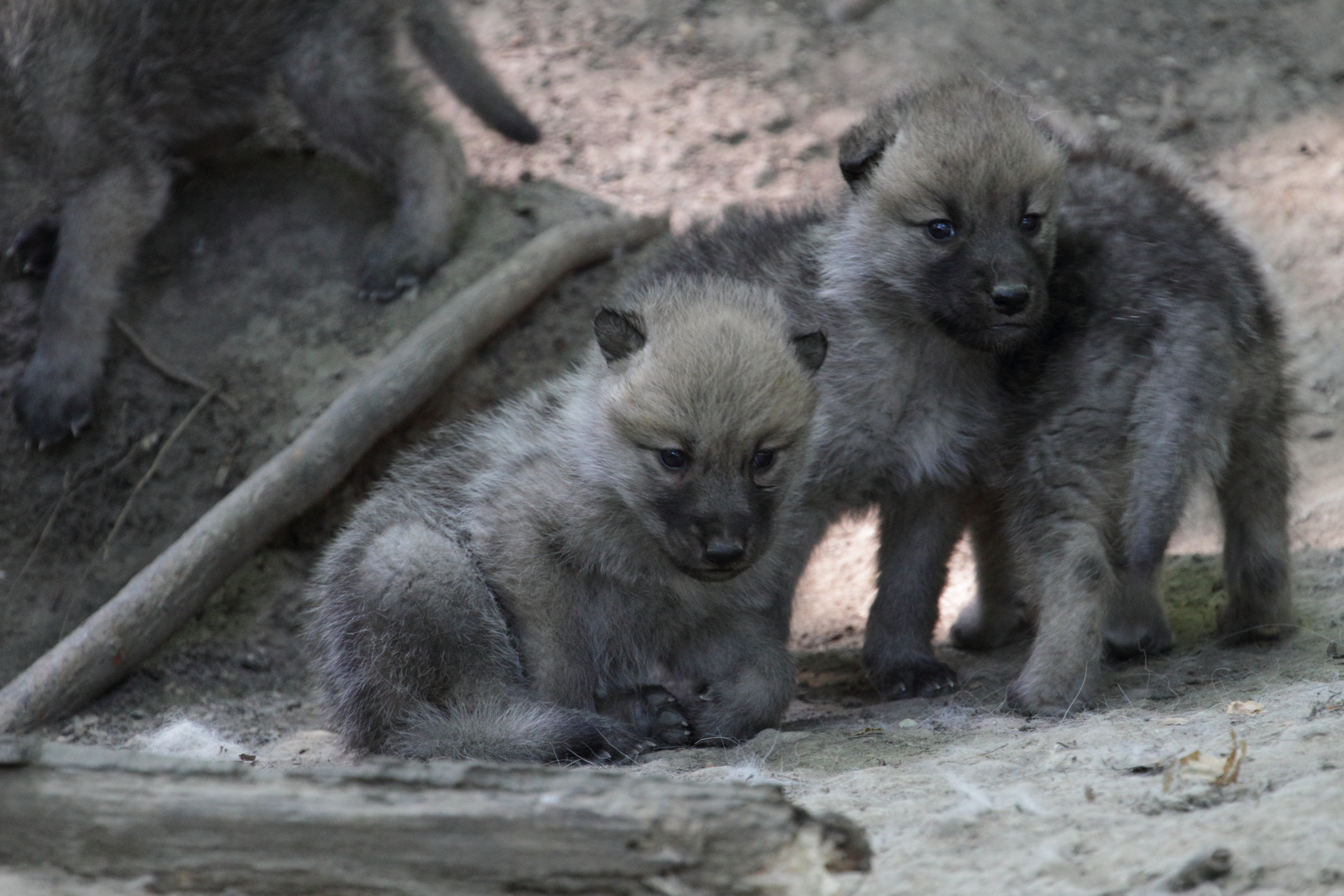 Junge Arktische Wölfe im Tiergarten Schönbrunn.